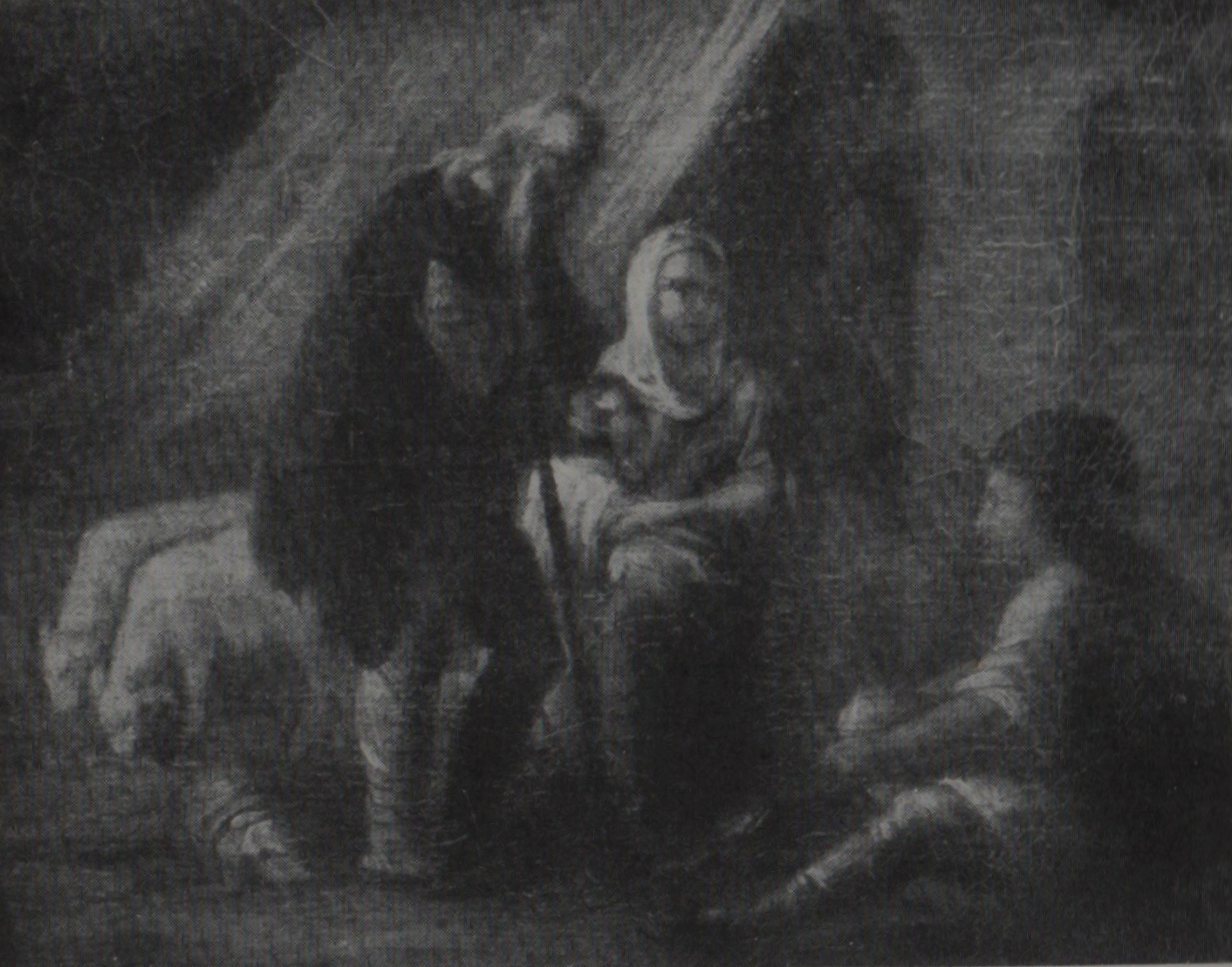 Gheorghe Tattarescu - Renasterea Romaniei (detaliu)